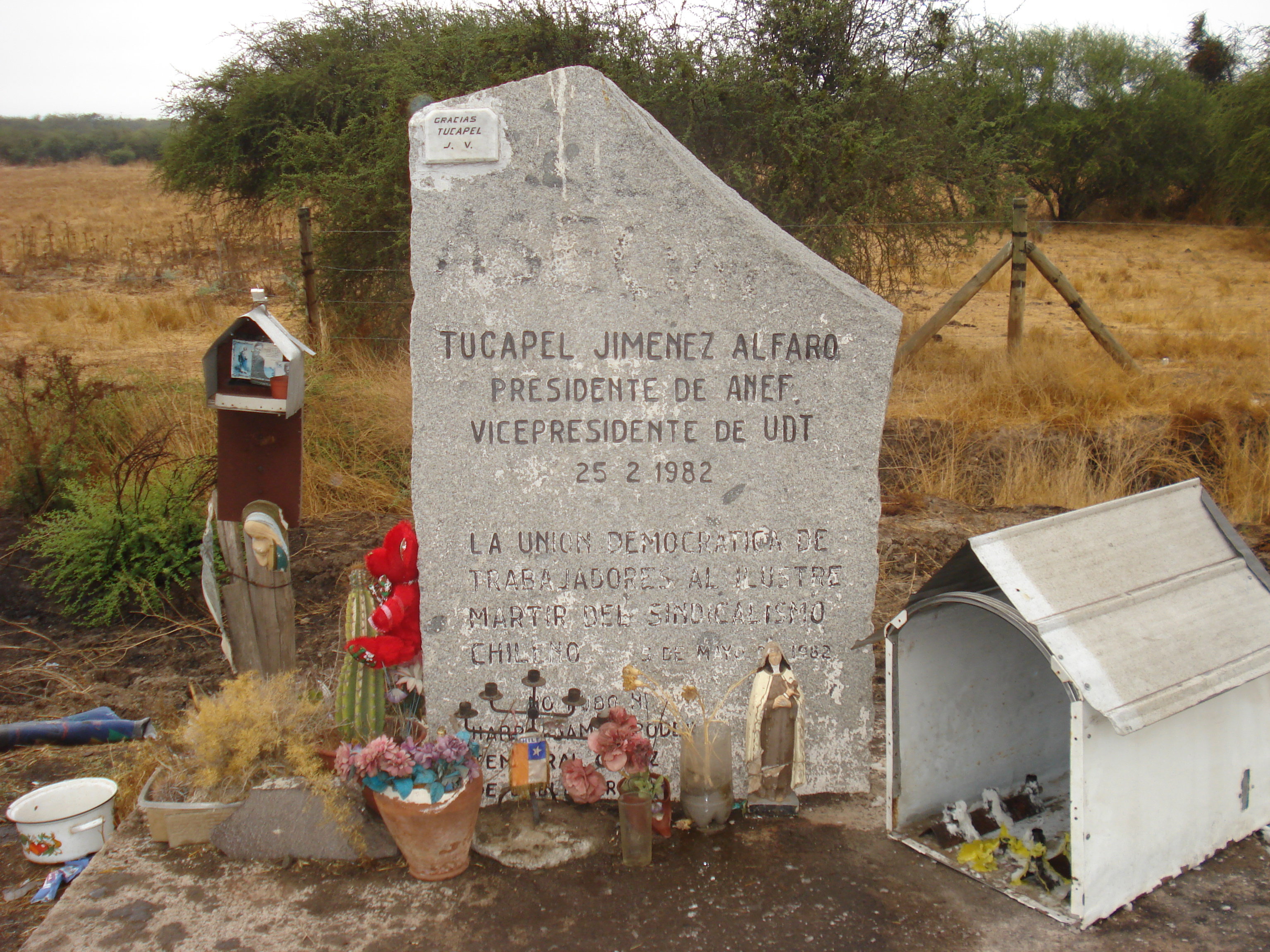 Memorial conmemorativo de la violación de los DDHH en Chile durante el régimen de Pinochet